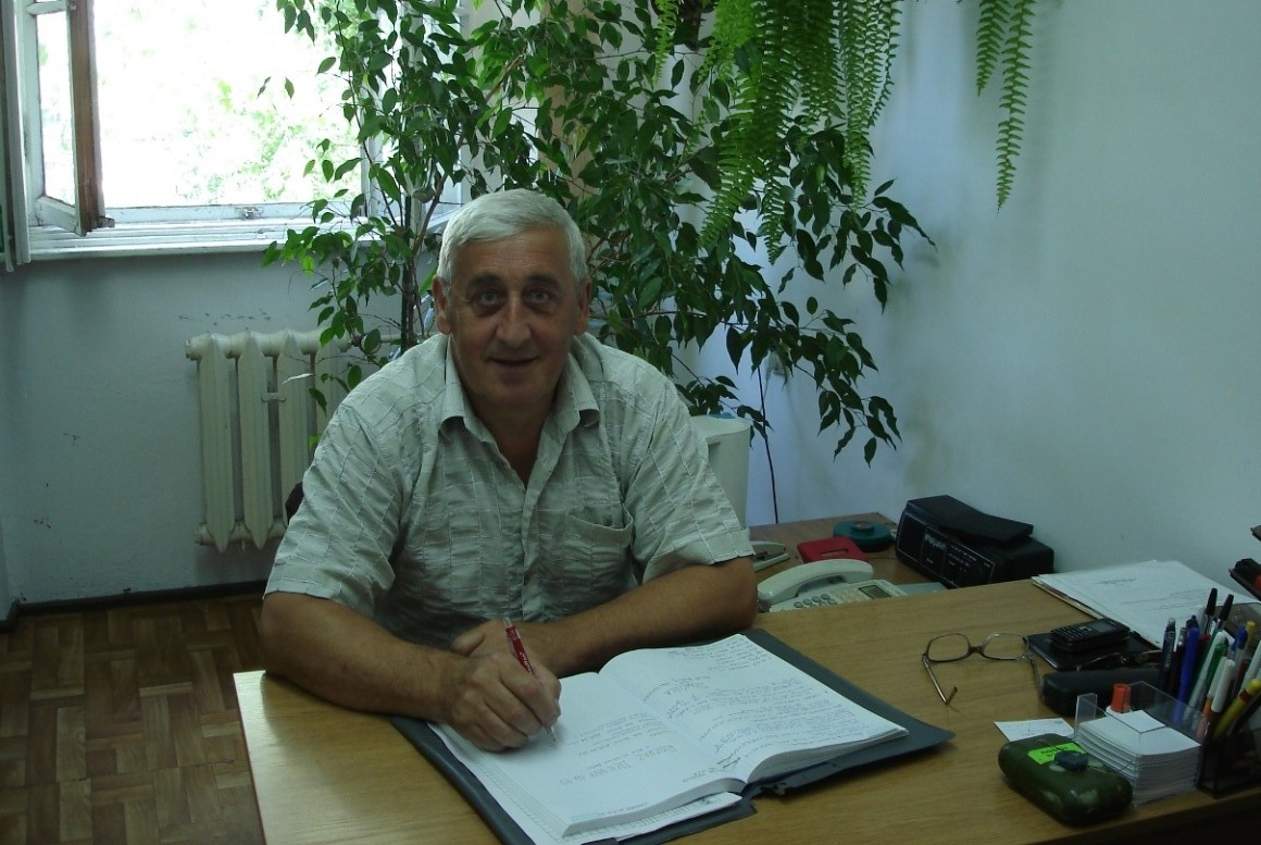 Stargard. Były szef sztabu 45 Batalion Medyczny–Szpital Wojskowy Edward Serejuk